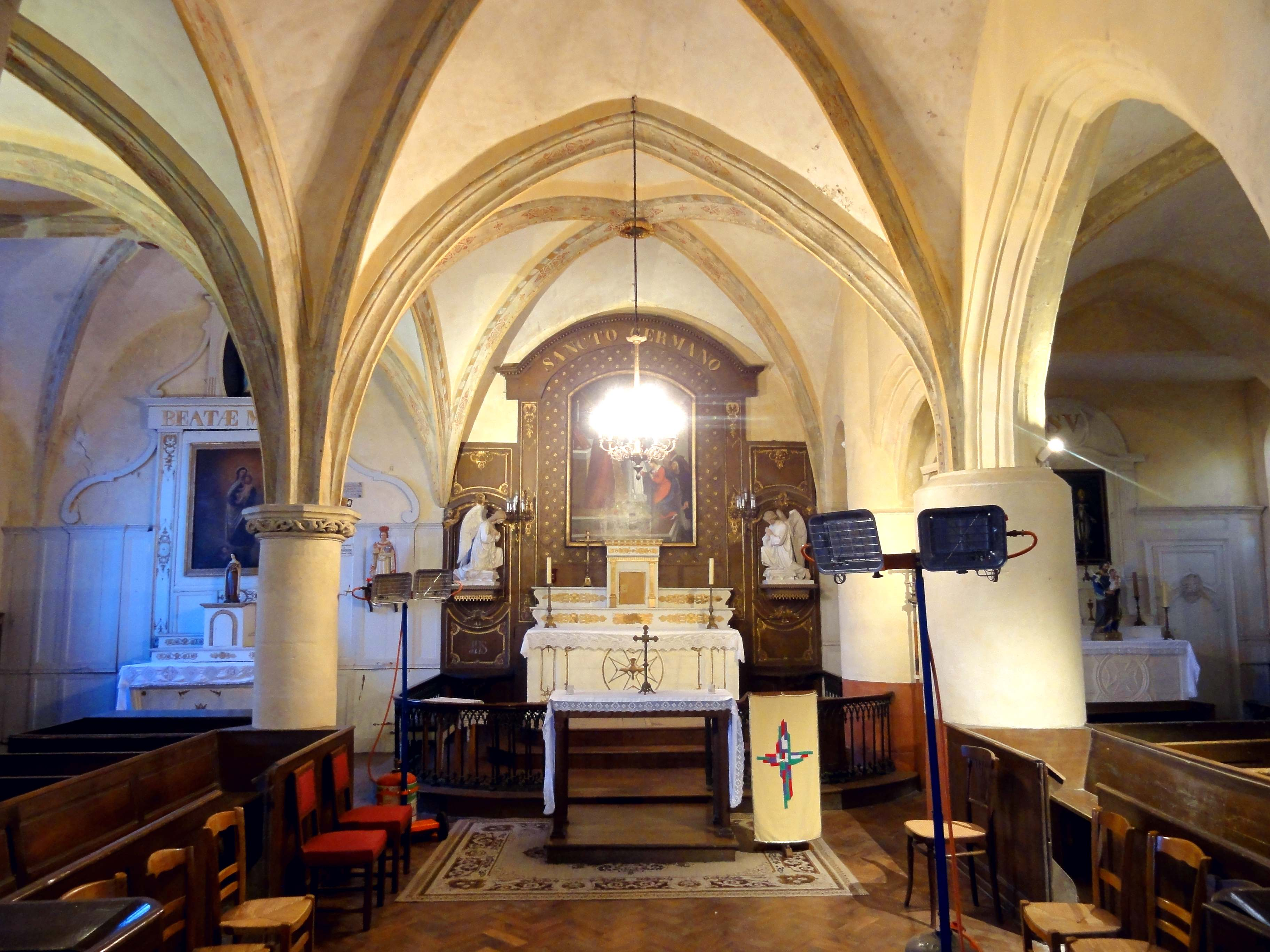 Intérieur de l'église - voir titre.